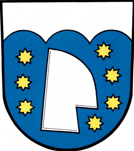 Znak, Vyšehoří, okres Šumperk